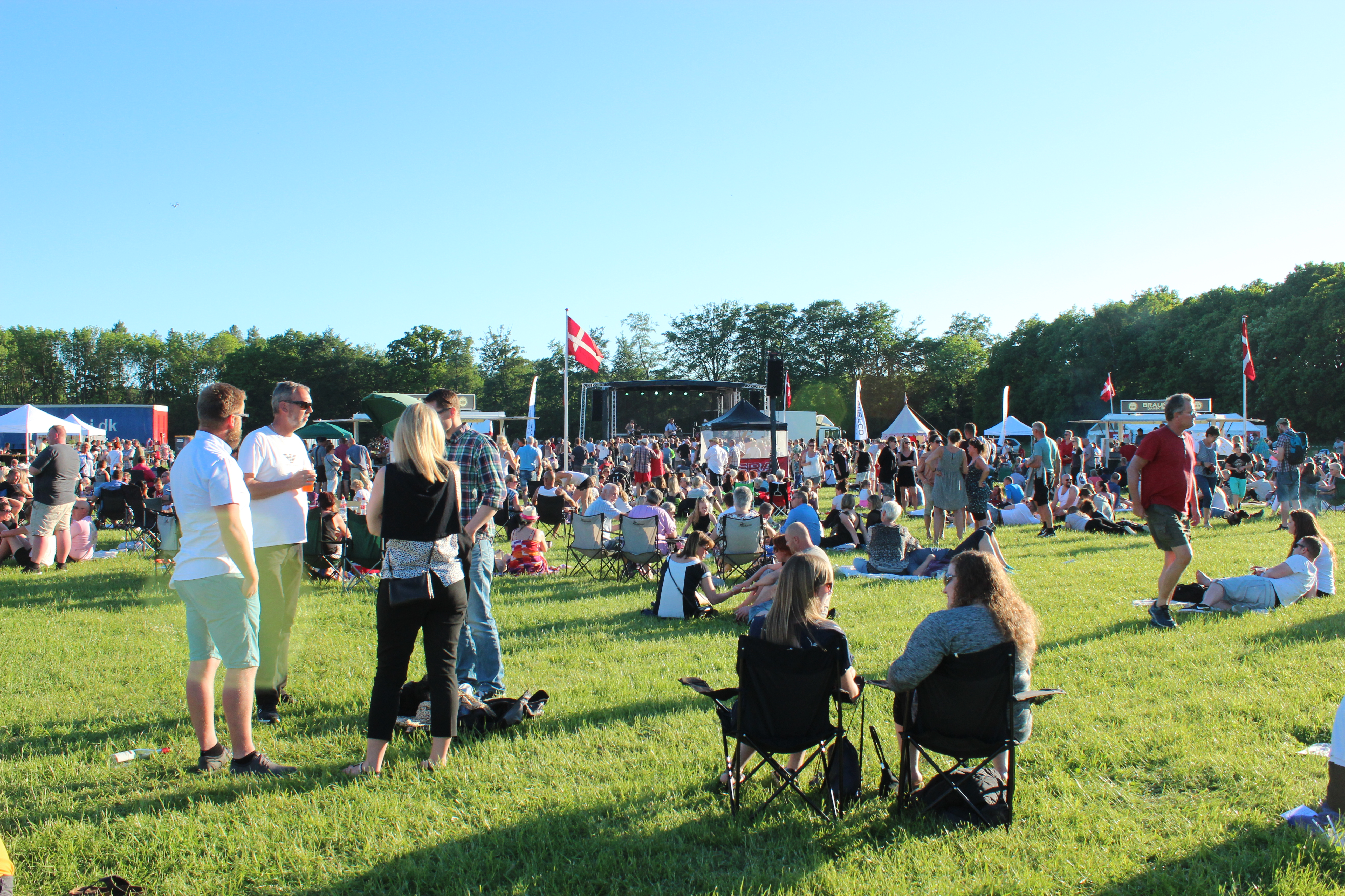 Danmark Dejligst d. 27. maj 2017.